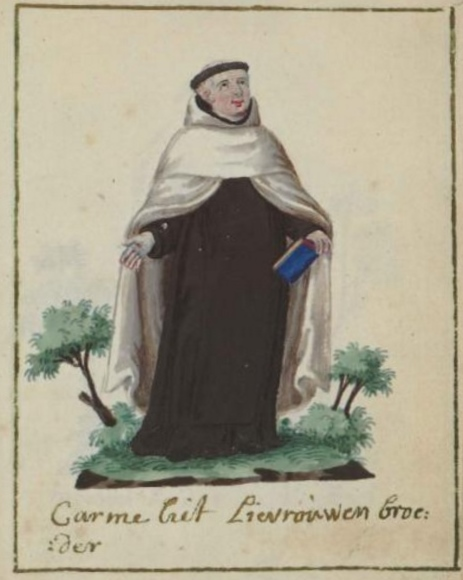 Antwerpse Onze Lieve Vrouwebroeder/Carmeliet op het einde van de 18e eeuw